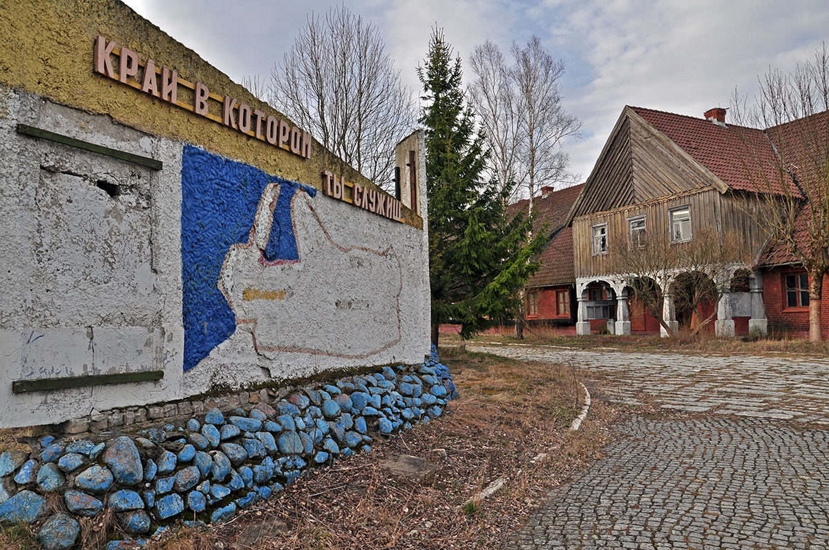 поселок Городково (Калининградская область)